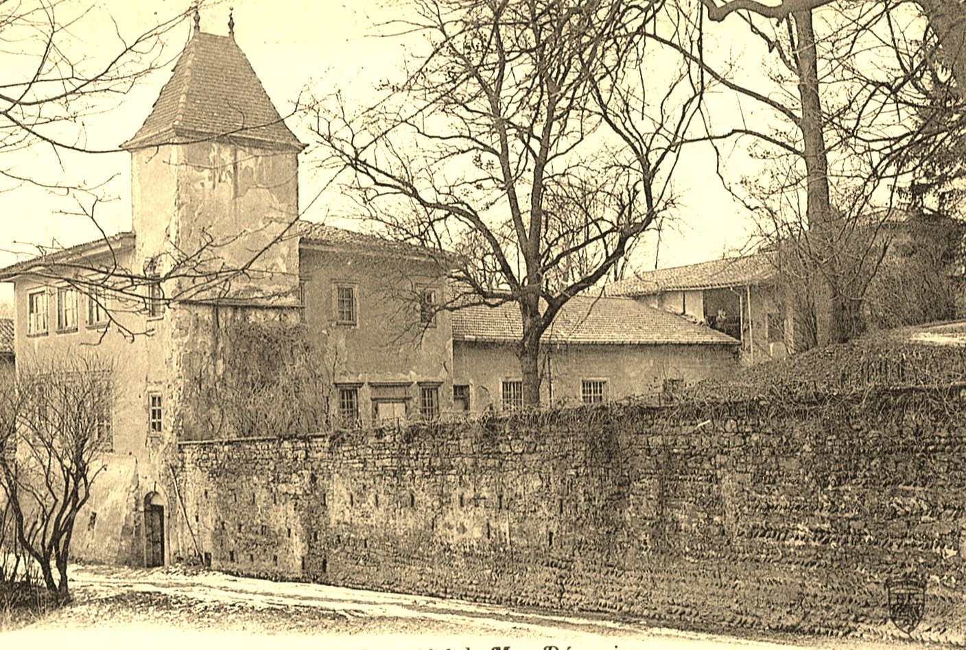 Ecully, Manoir du Treuil, anciennement appelé les Arcs ou La Vernique. Au XIX e siècle propriété de la famille Laporte.